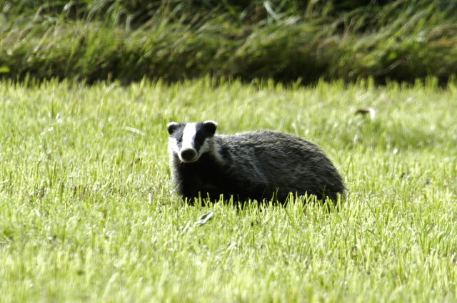 Meles meles from Commanster, Belgian High Ardennes.